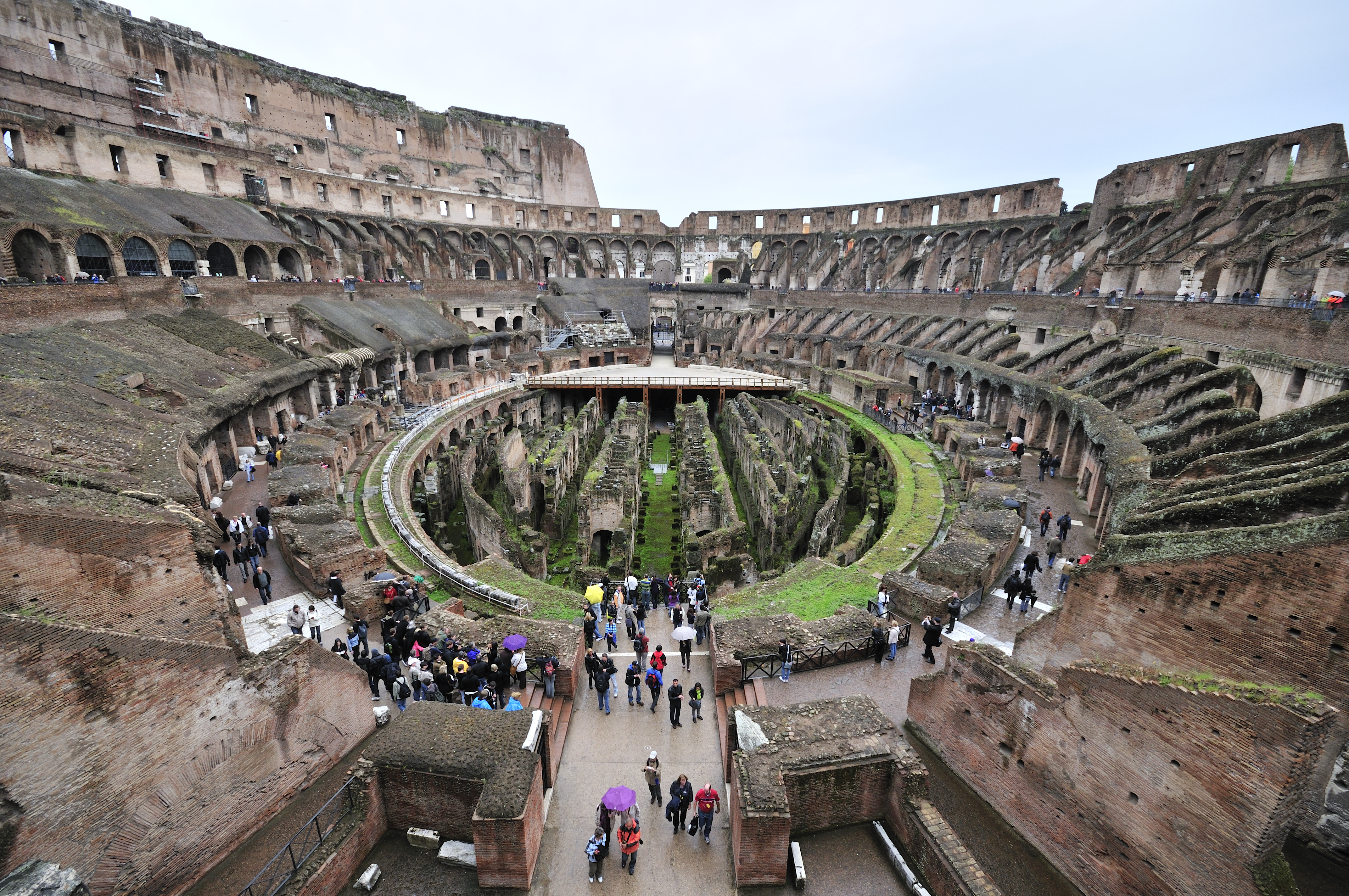 Colosseo